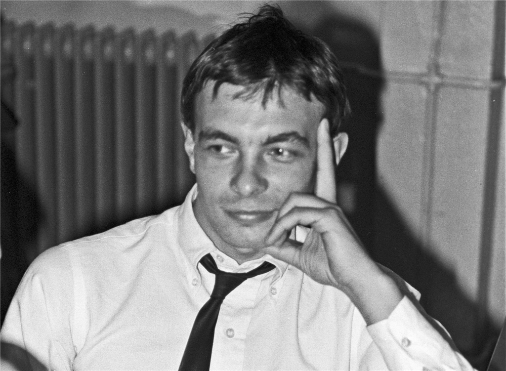 Karl Bartos (Kraftwerk) photographié à Zürich en 1976.